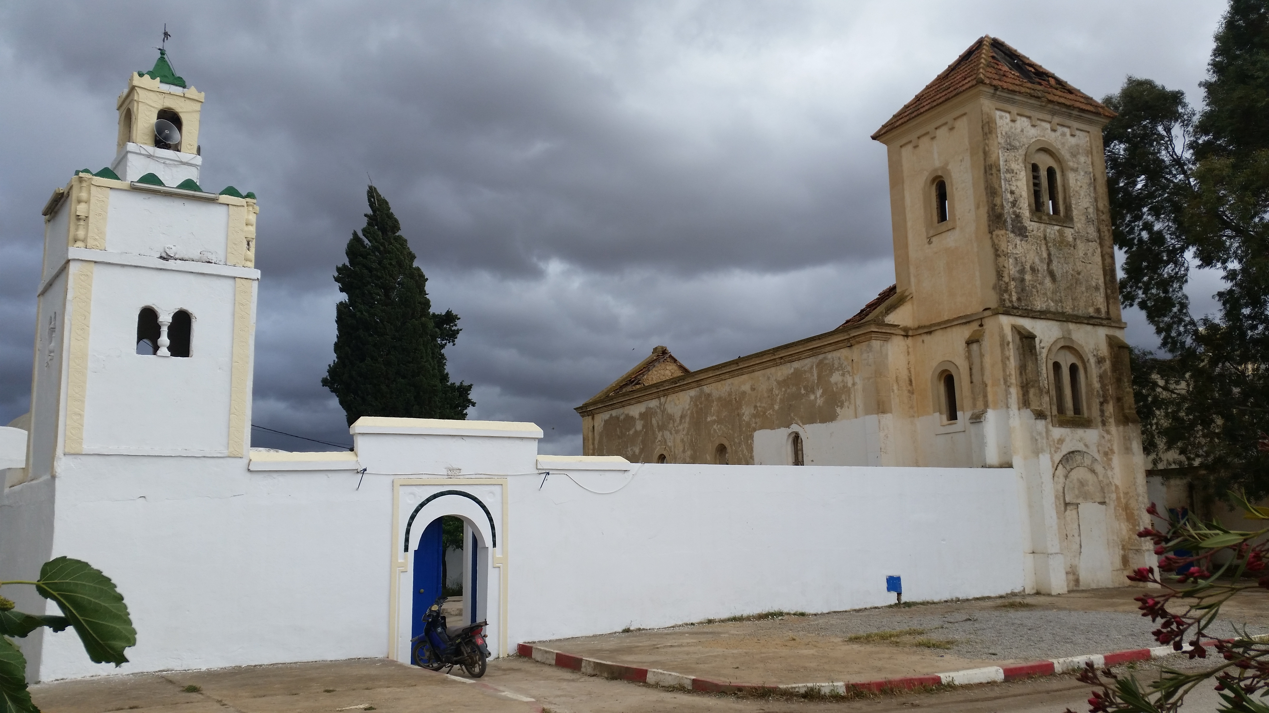 Façade est de l'ancienne église d'El Mehrine en Tunisie